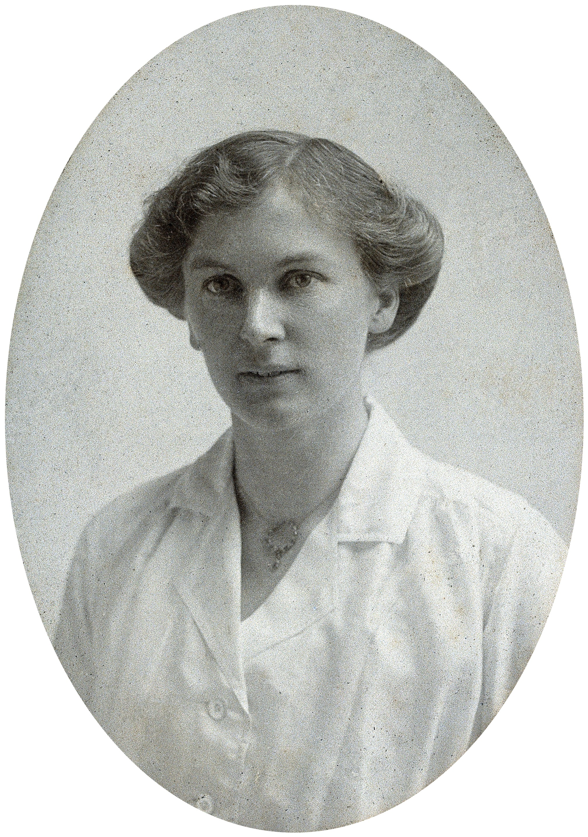 May Mellanby.